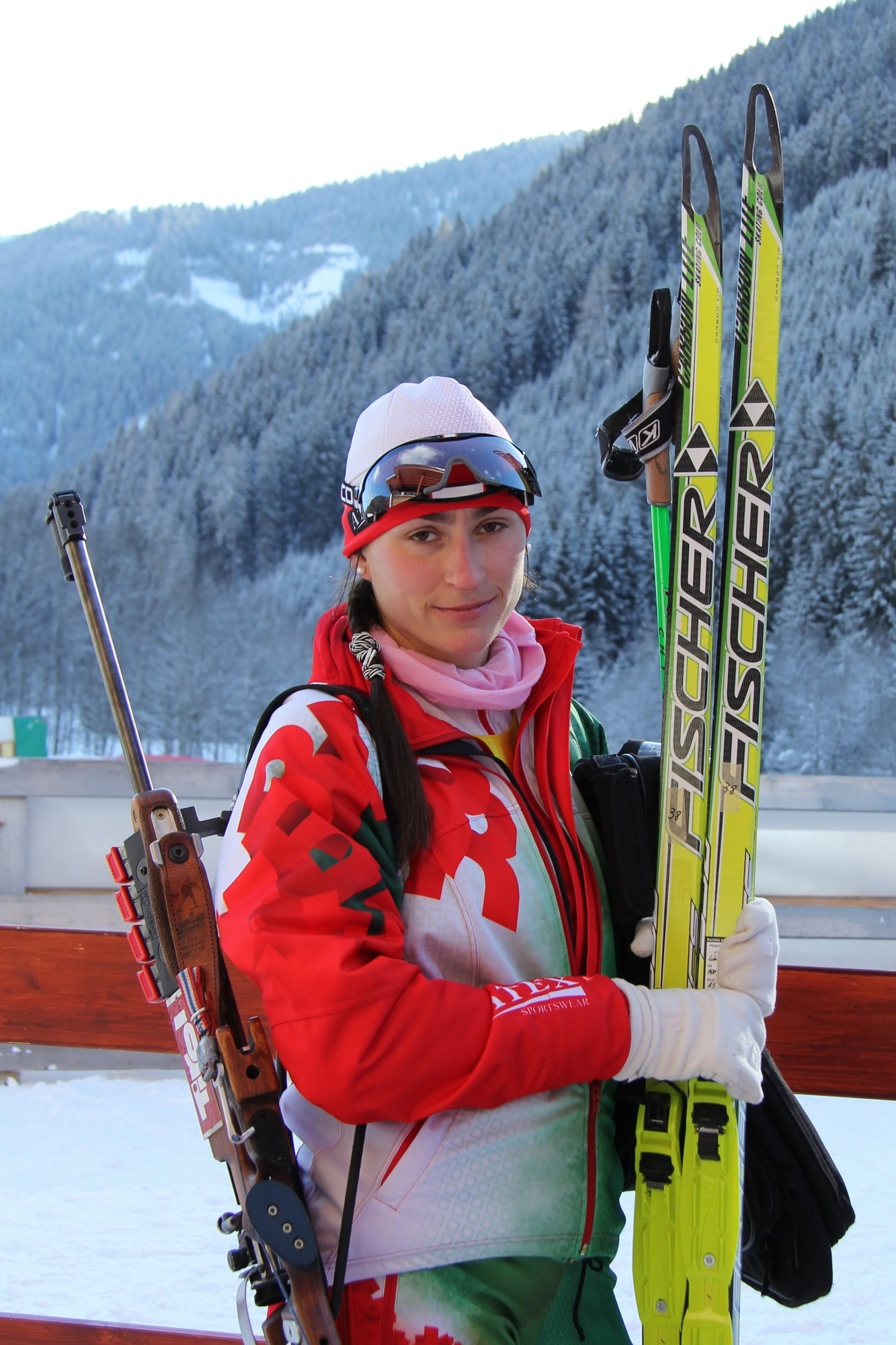 Nastassia Dubarezava (BLR)